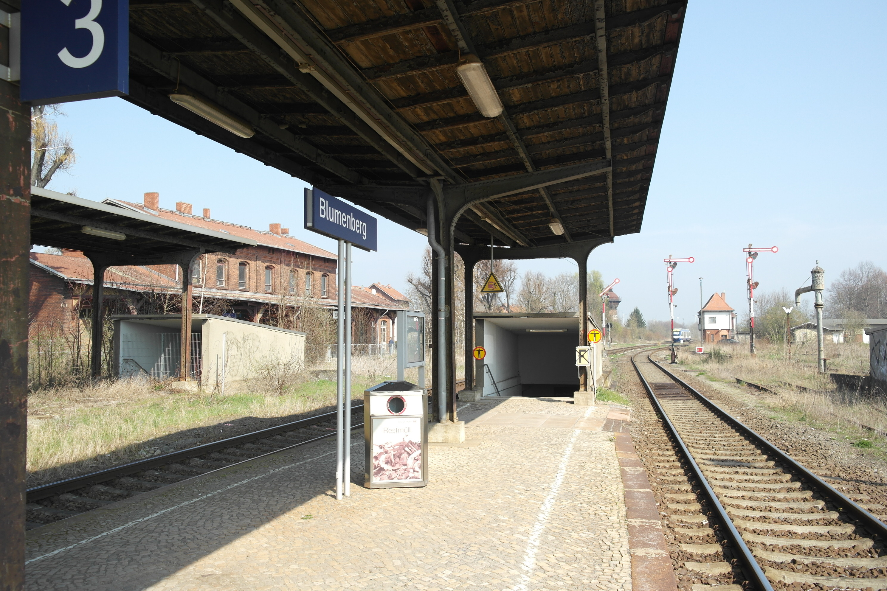 Bahnhof Blumenberg, noch genutzter Bahnsteig 2/3, Blick nach Osten, links das Empfangsgebäude